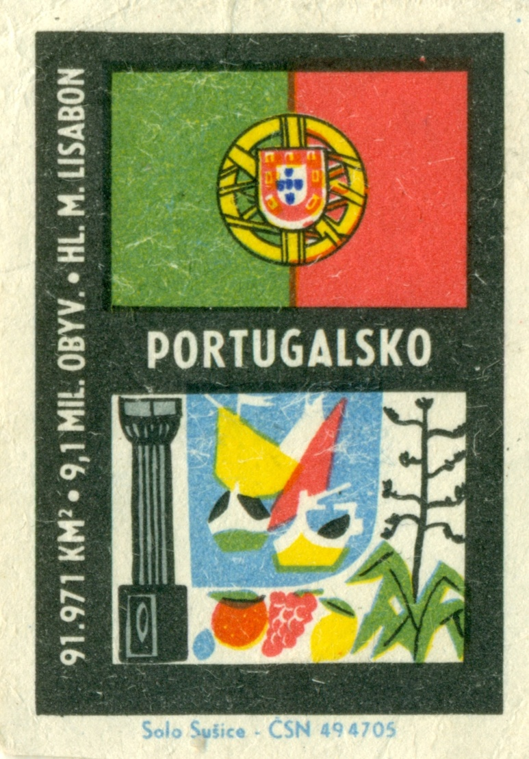 nálepky